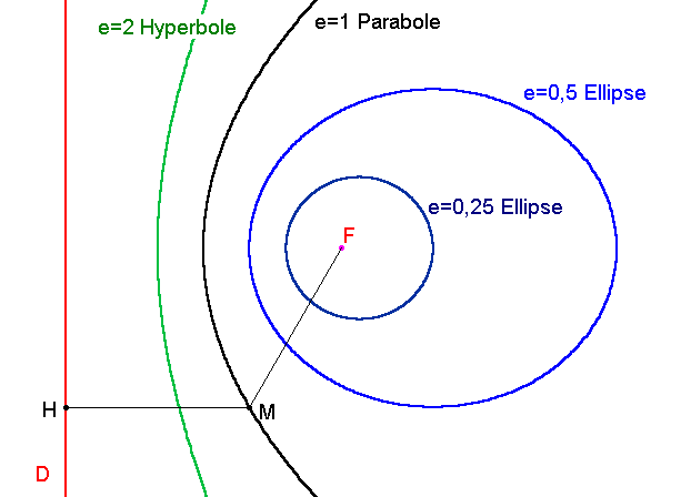 Excentricité d'une conique Dessin réalisé avec le logiciel gratuit WinPlot. Licence GFDL Christian Amet